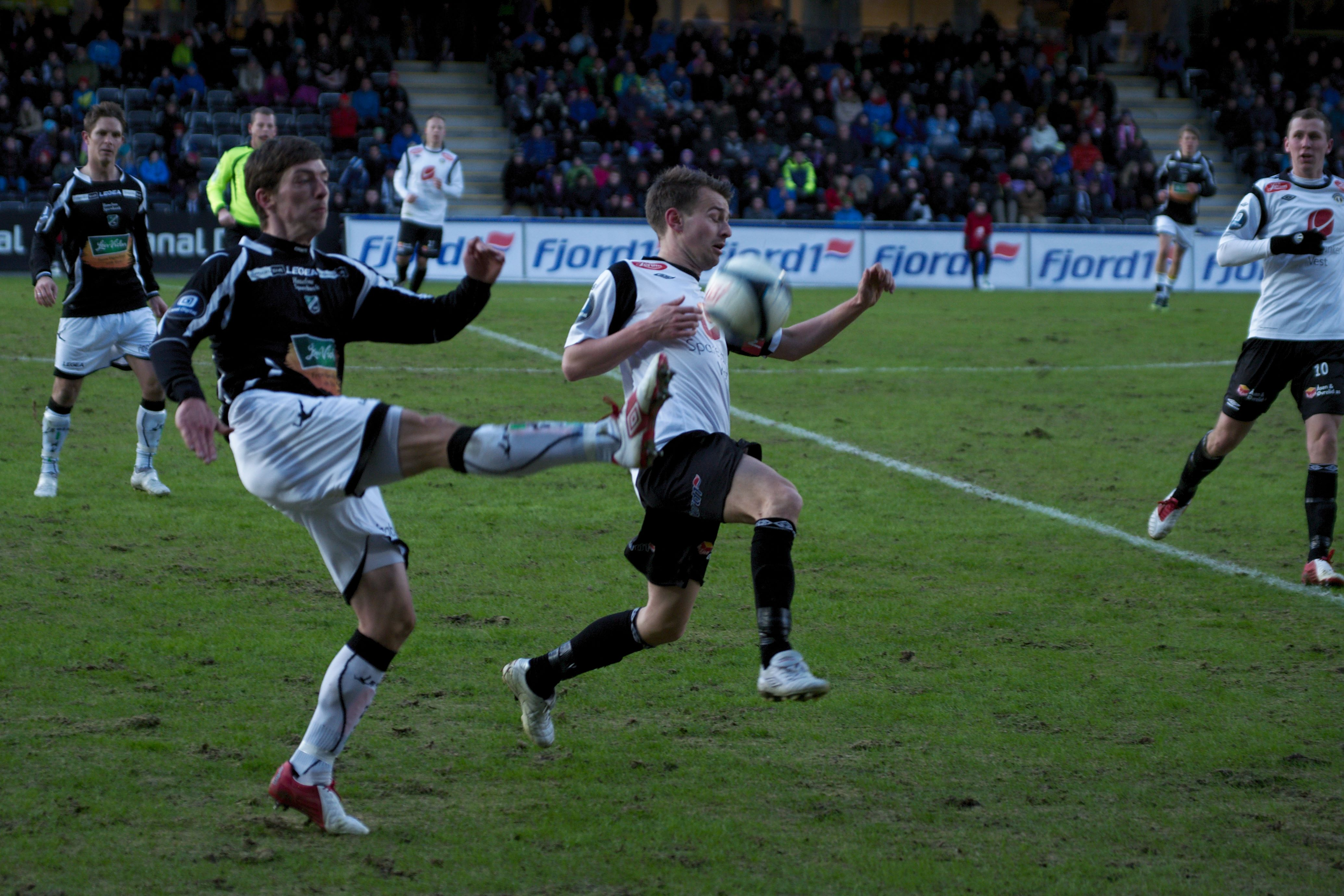 Arnor Adalsteinsson and Henrik Furebotn